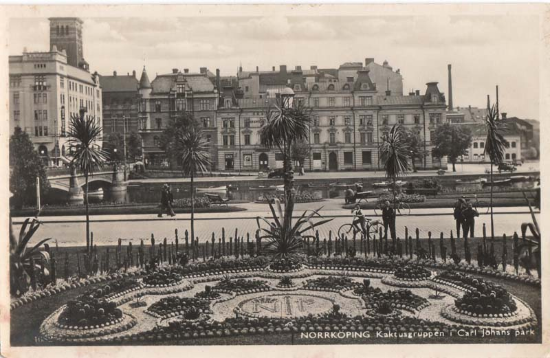 Kaktusplanteringen vid Motala ström i Norrköping, motiv för år 1936.